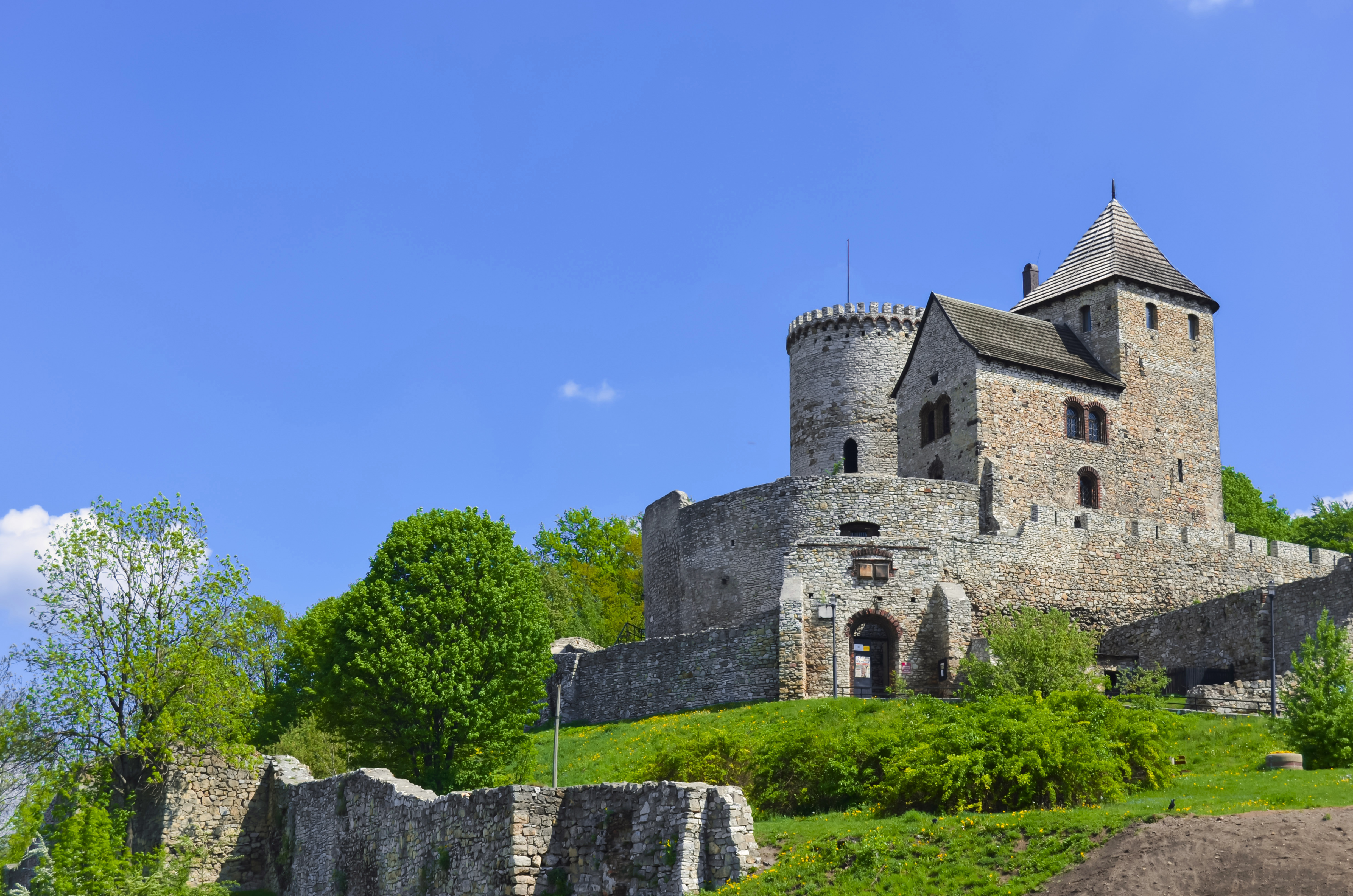 Bêdzin, zamek, XIV w.